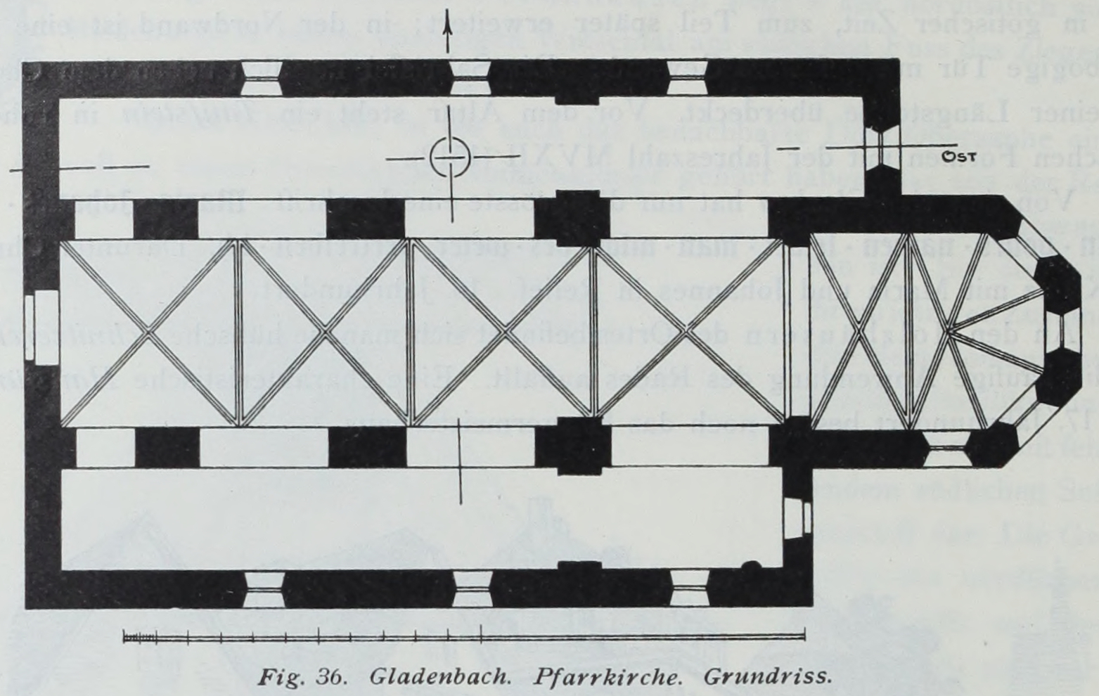 Gladenbach Pfarrkirche Grundriss